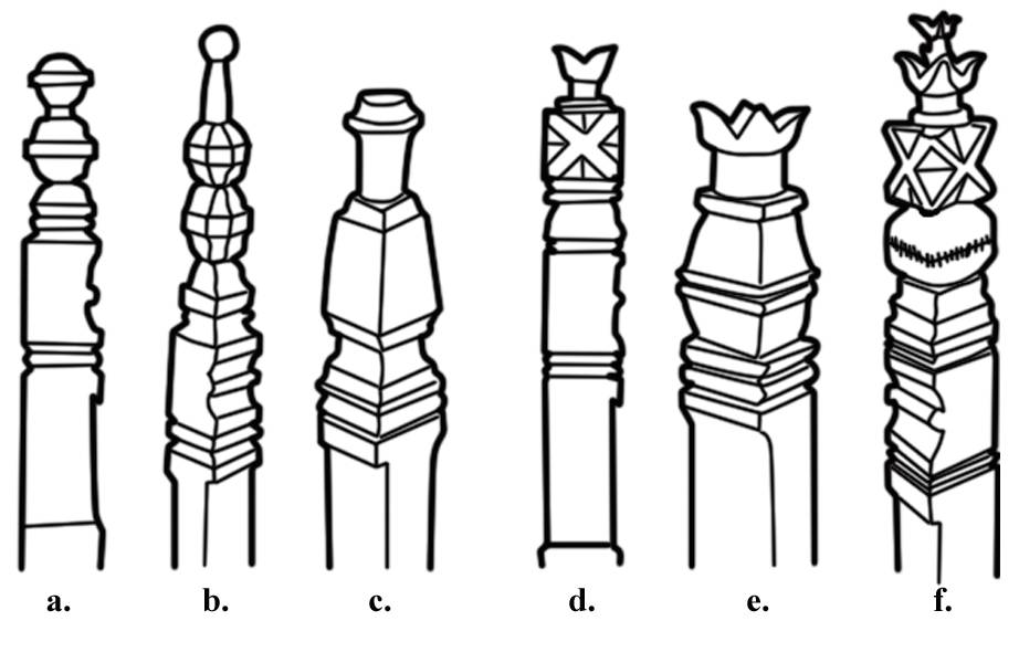 Przykłady męskich (a-c) i żeńskich (d-f) słupów szeklerskich.